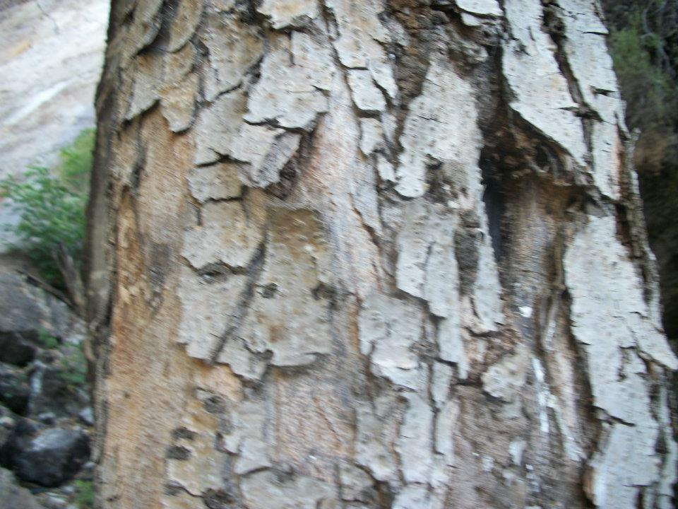 Casca em lâminas irrregulares e quebradiças da braúna